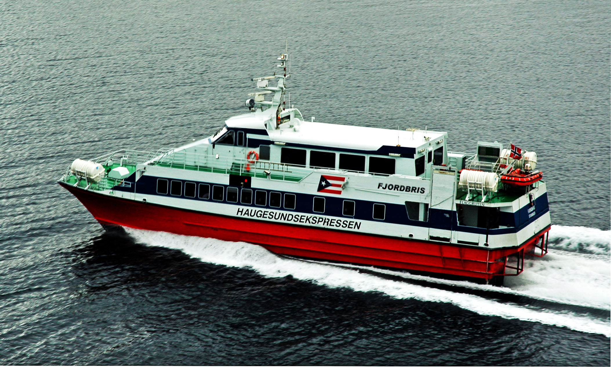 Haugesundsekspressen på vei mot Stavanger passerer Bokn Name of ship: Fjordbris IMO Number: 9008768 MMSI Number: 257147400 Callsign: LDNF Length: 26 m Beam: 8 m